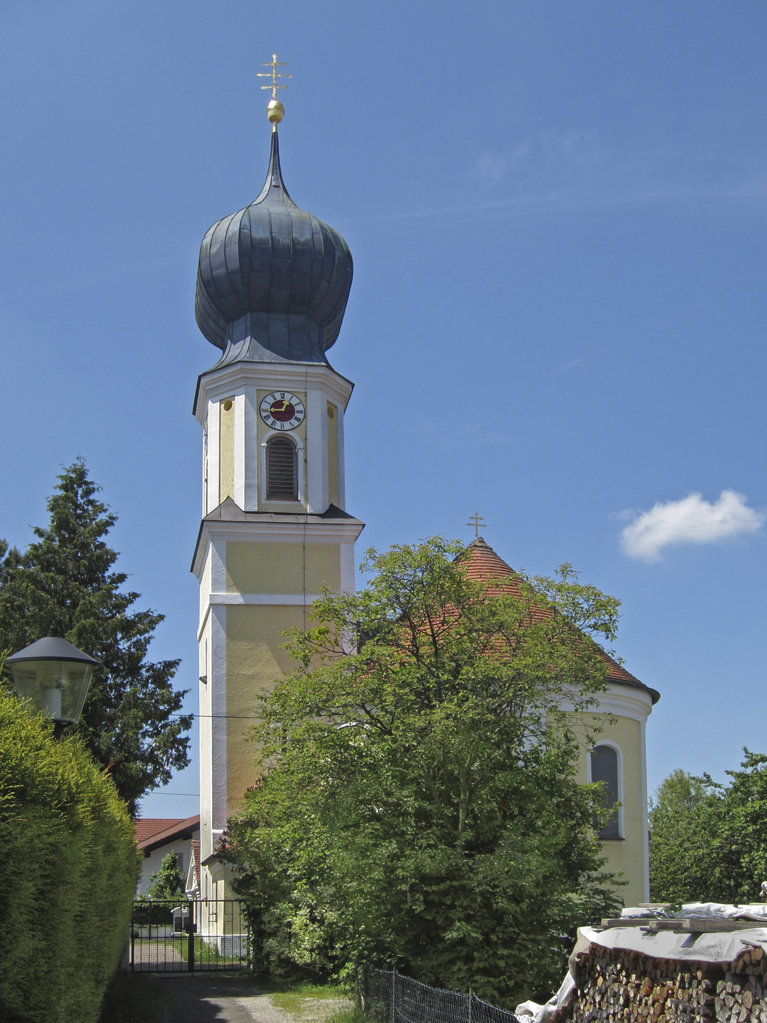 Mittbach; katholische Filialkirche St. Urban, Saalbau mit leicht eingezogener Apsis, Chorflankenturm mit Zwiebelhaube und angefügter Sakristei, Turm gotisch, sonst wohl Neubau erste Hälfte 18. Jahrhundert.